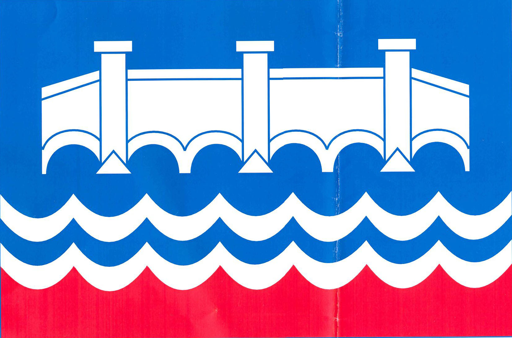 Vlajka města Bělá nad Radbuzou